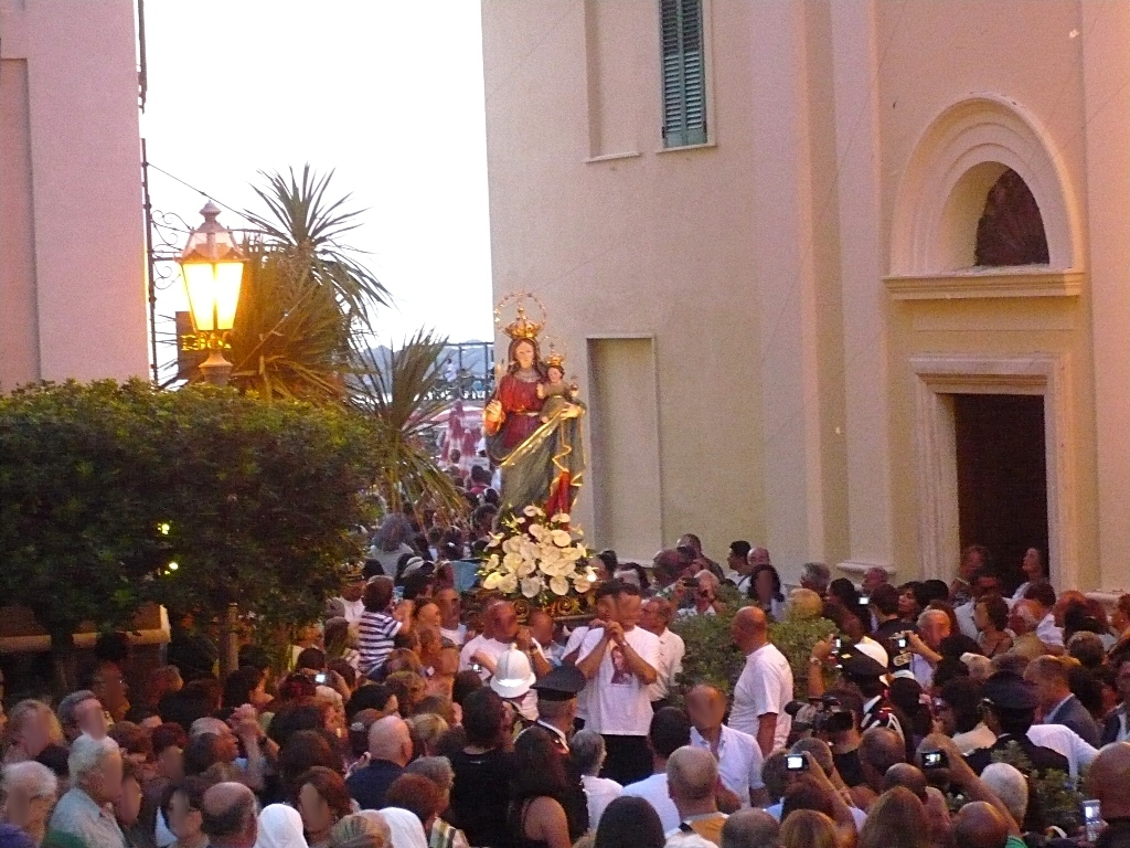 La processione di s.maria a mare a s.maria di castellabate (salerno) il 15 agosto 2011